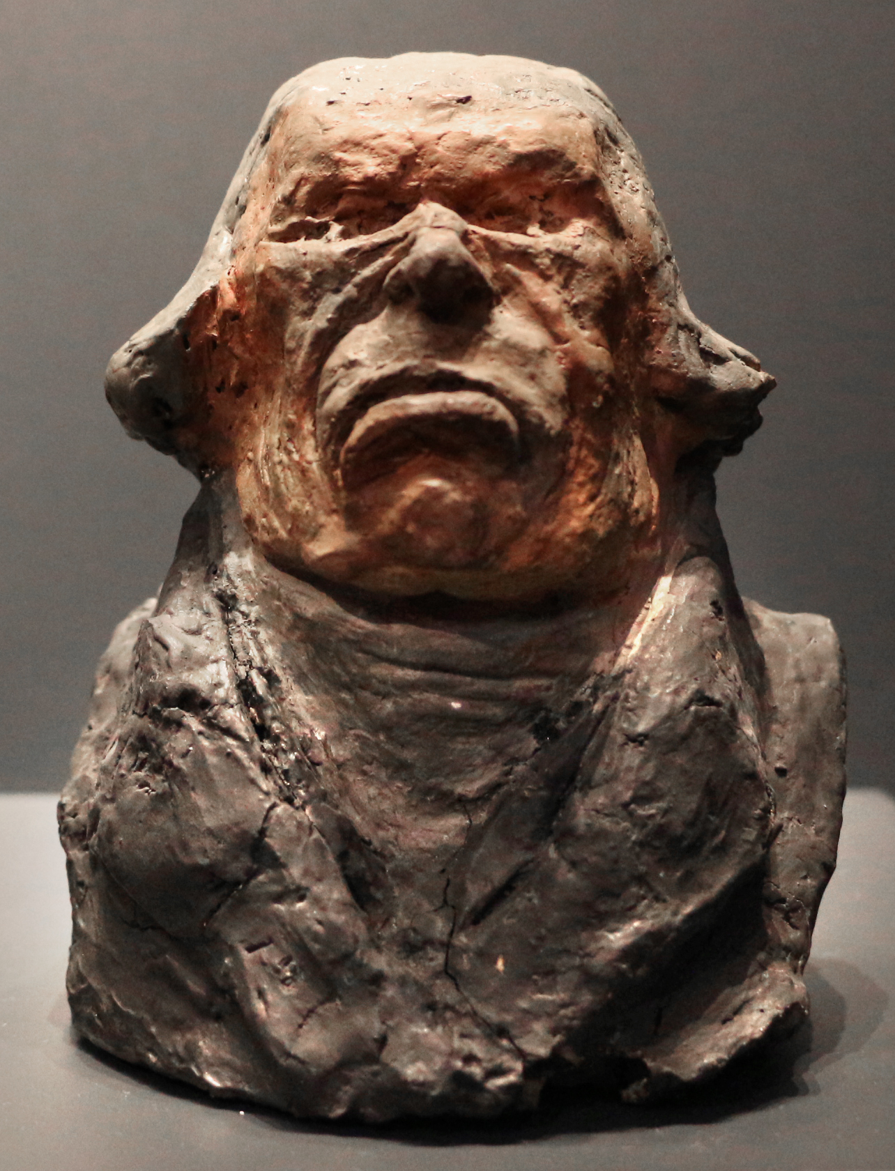 Antoine Odier, banquier et député